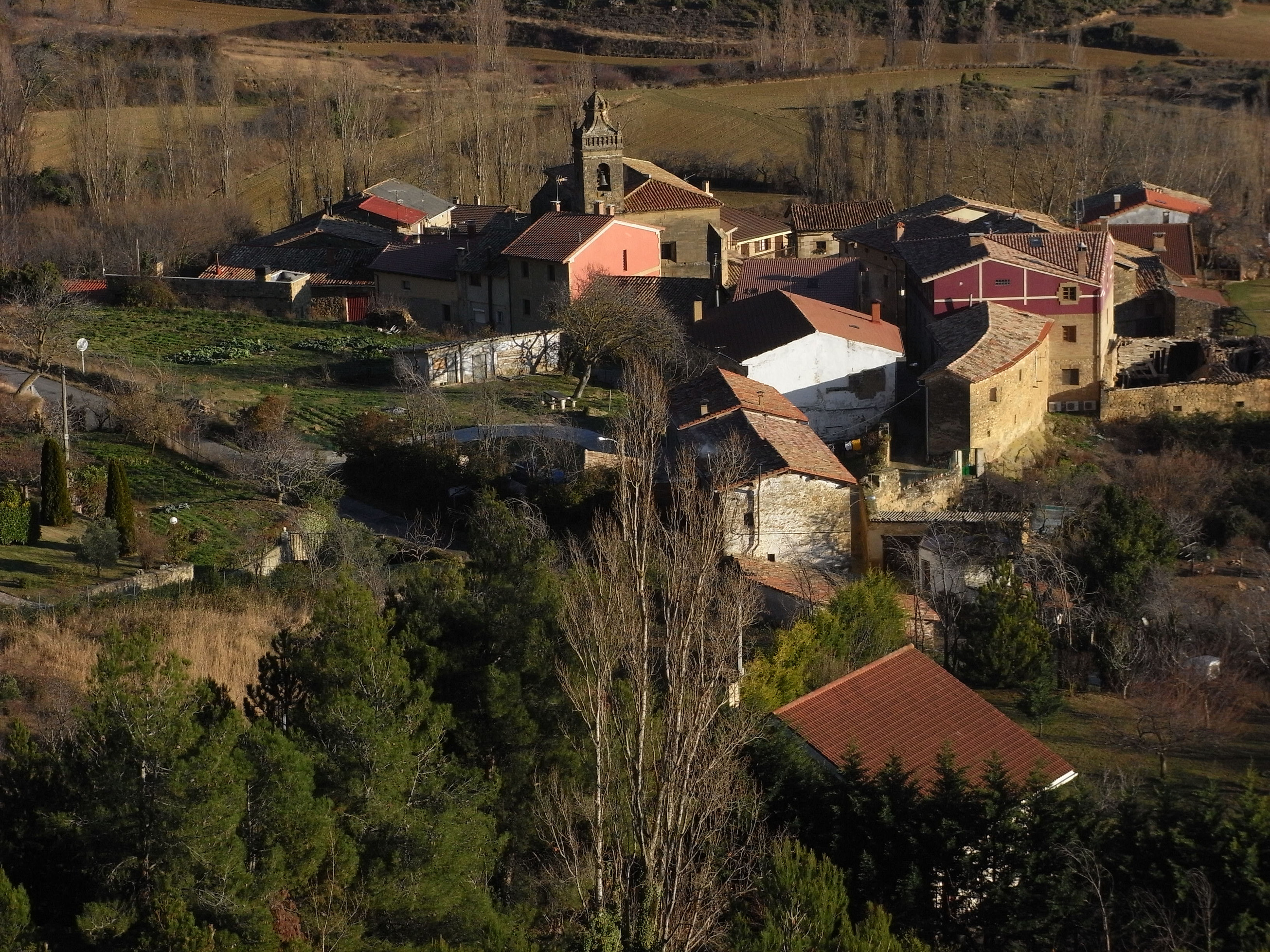 Vista general de Rivas de Tereso en La Rioja (España)